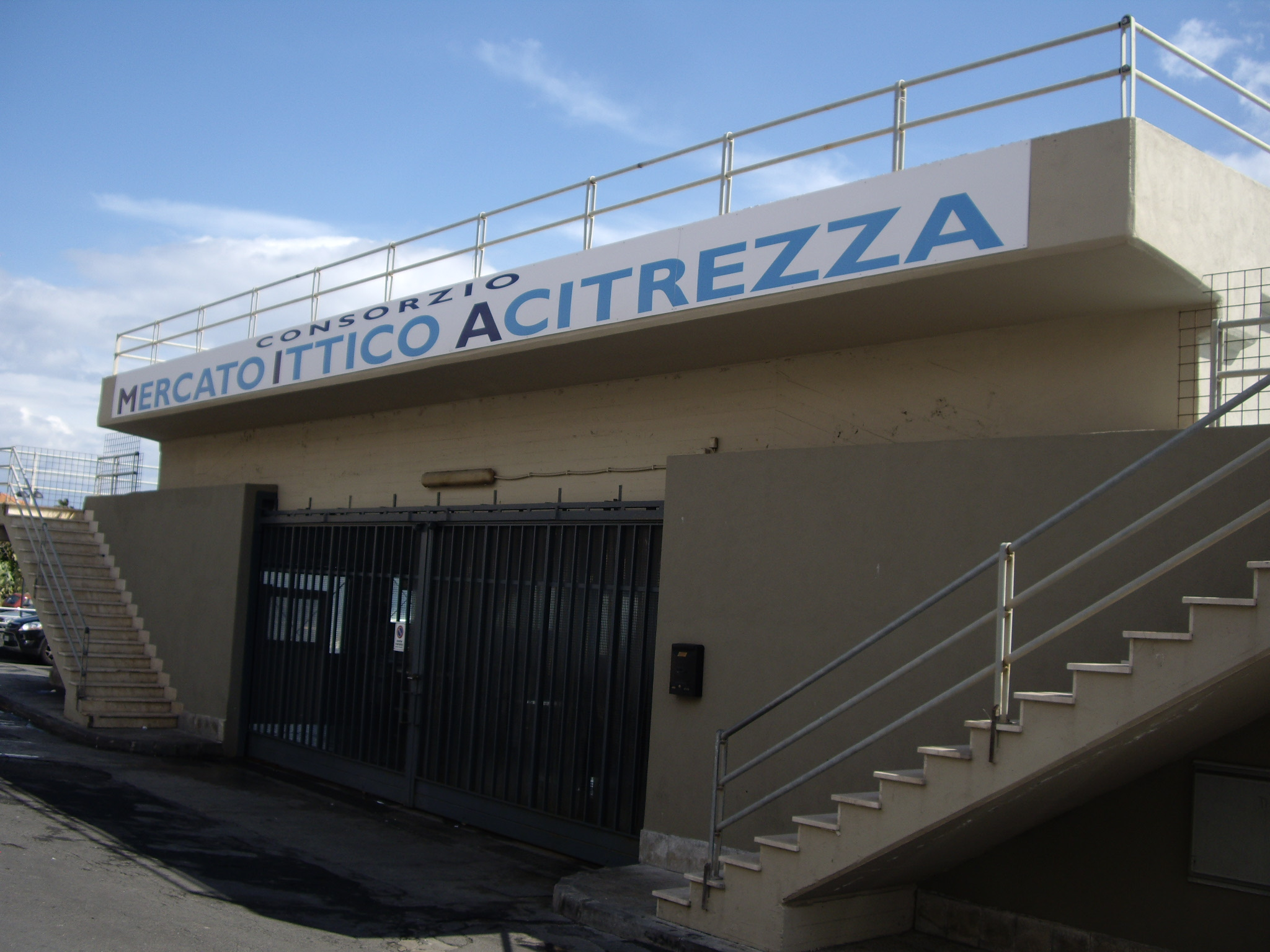 Arrain-lonja